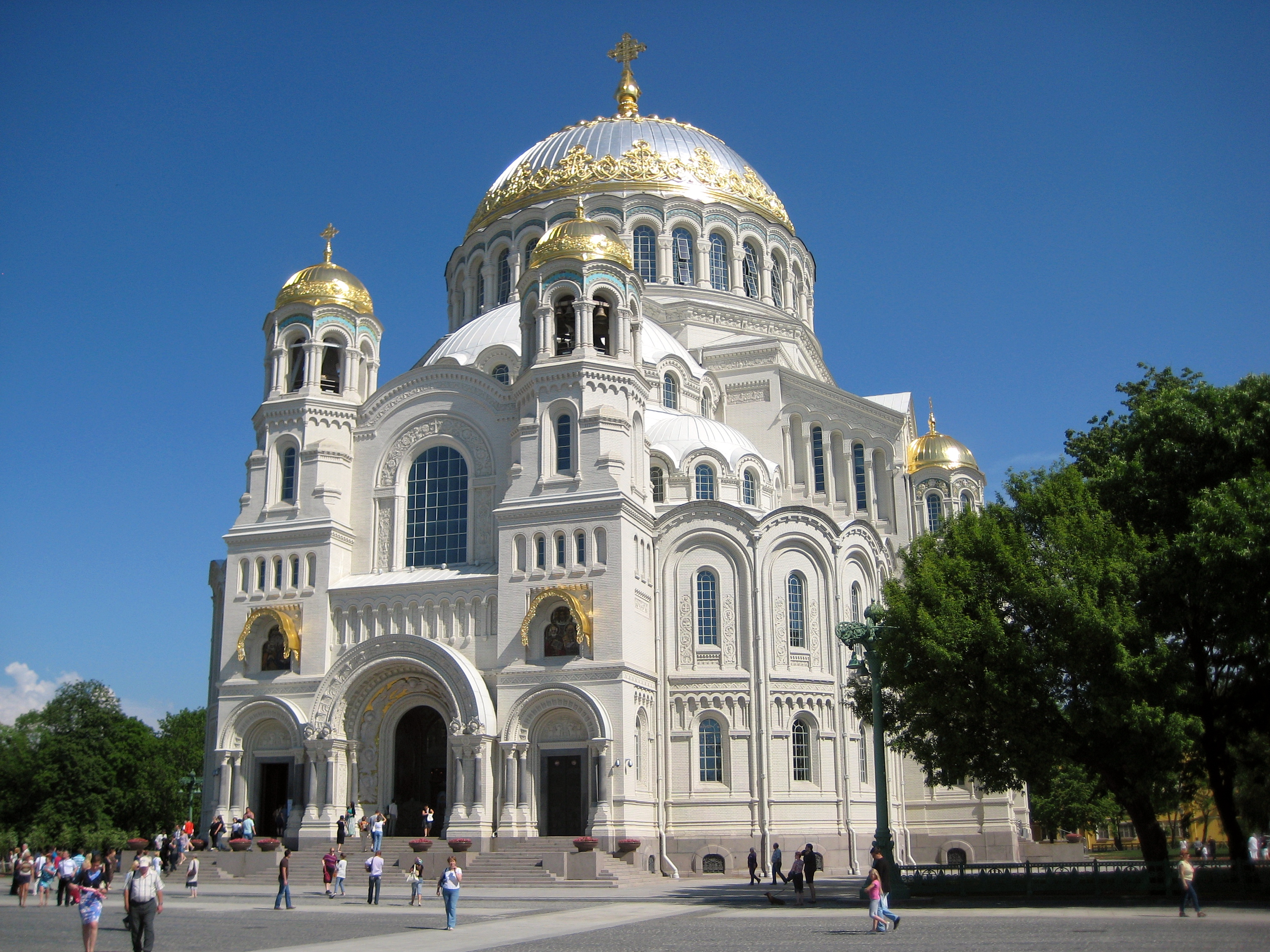 Кронштадт. Морской собор.